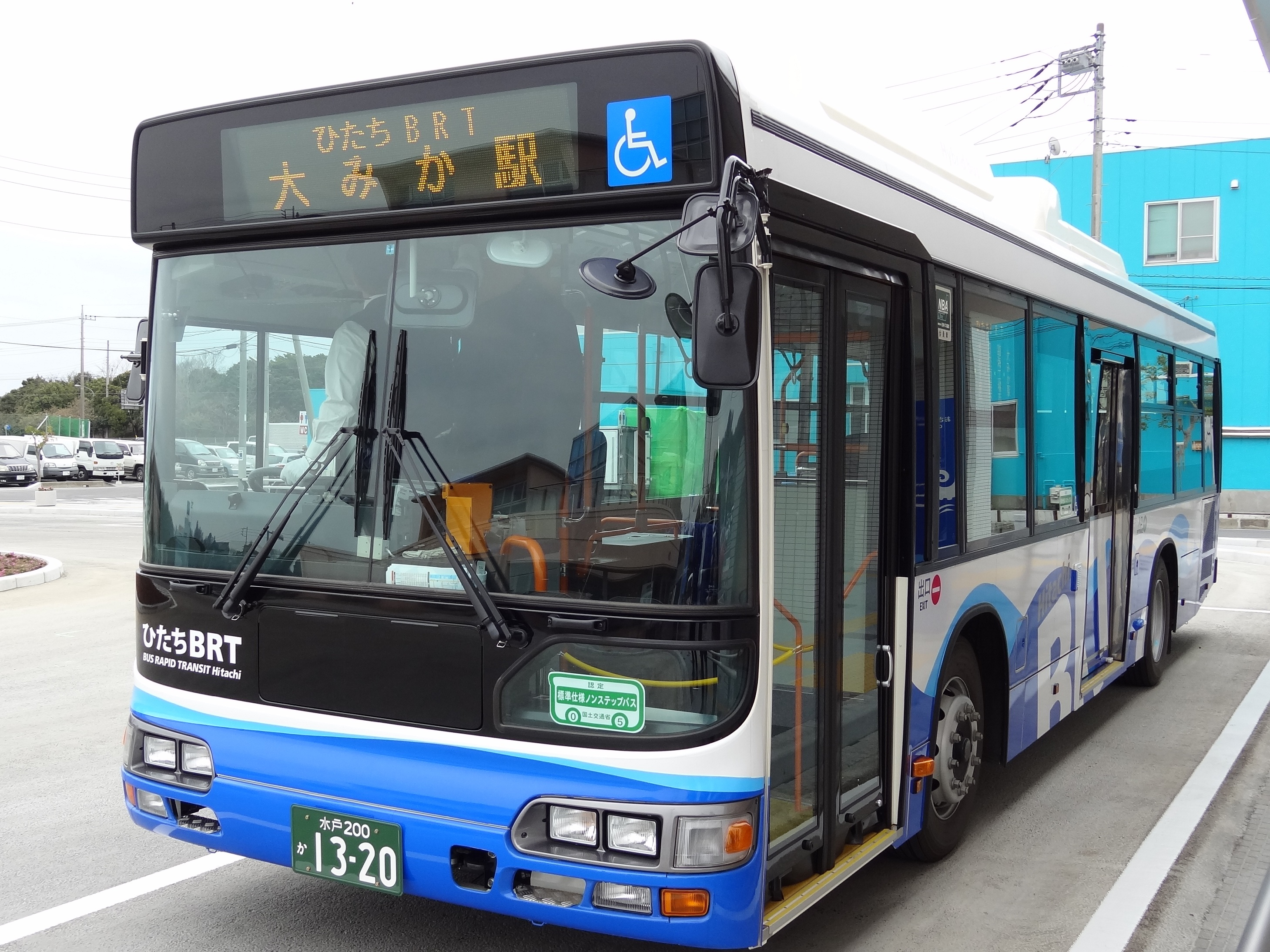 ひたちBRT用車両（ブルーラピッド）